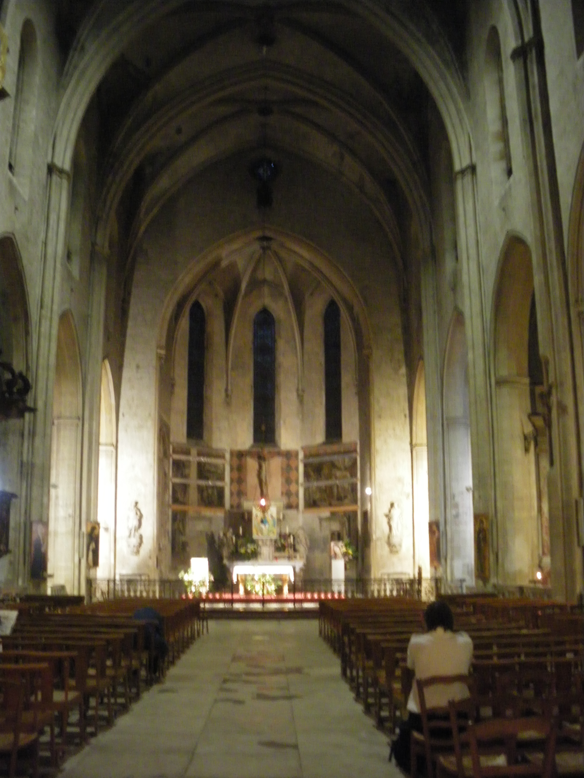 église Saint Didier, Avignon